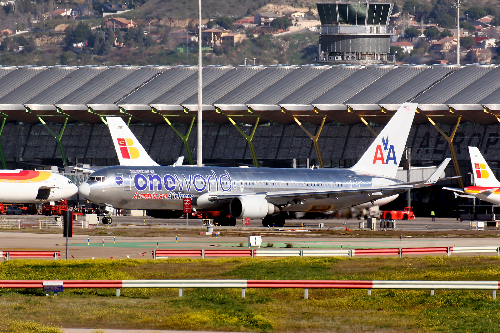 Madrid - Barajas Airport (LEMD/MAD)